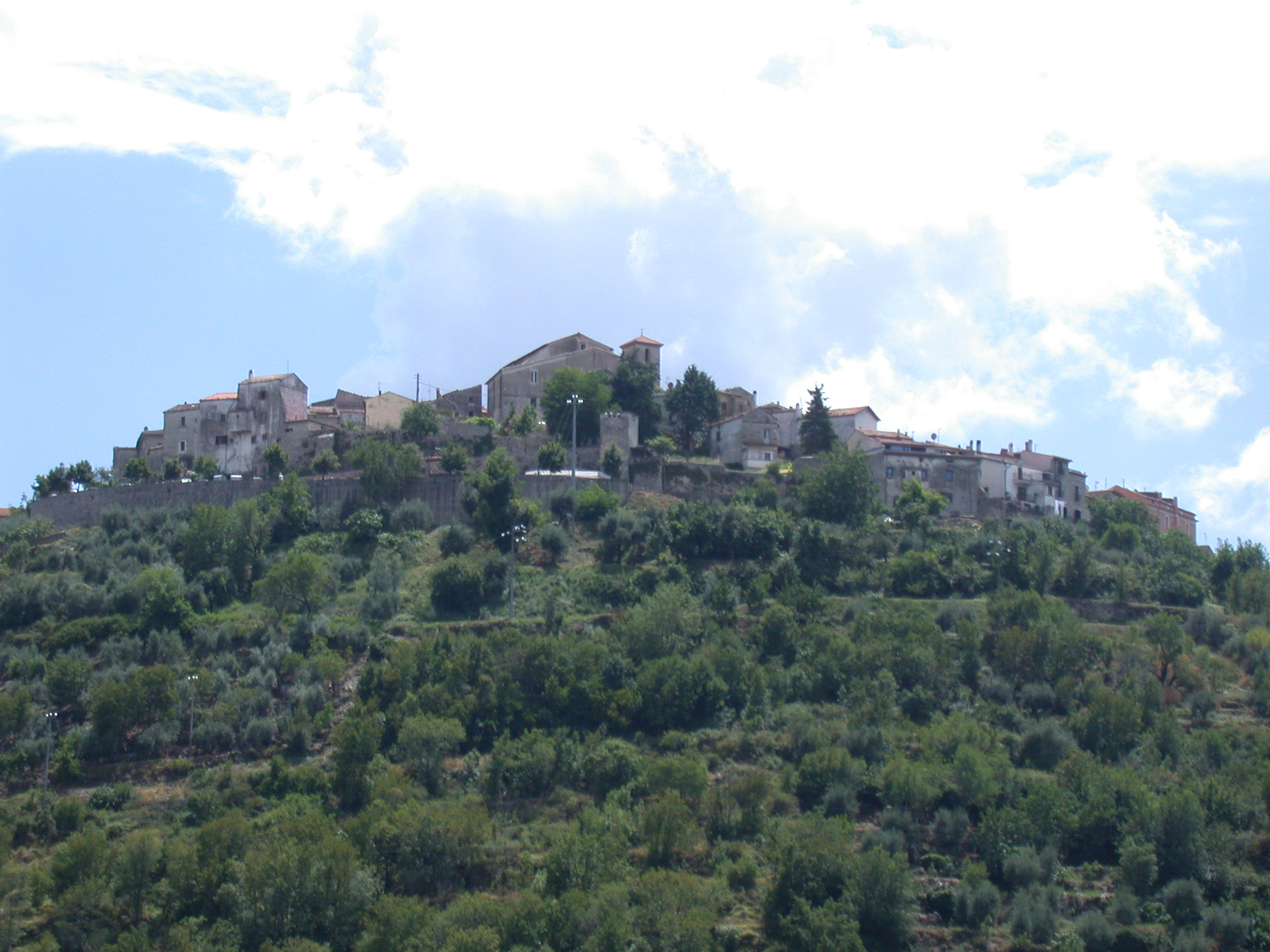 Campodimele (Italia, Lazio, provincia di Latina. Panorama dalla strada verso il convento di Sant'Onofrio.